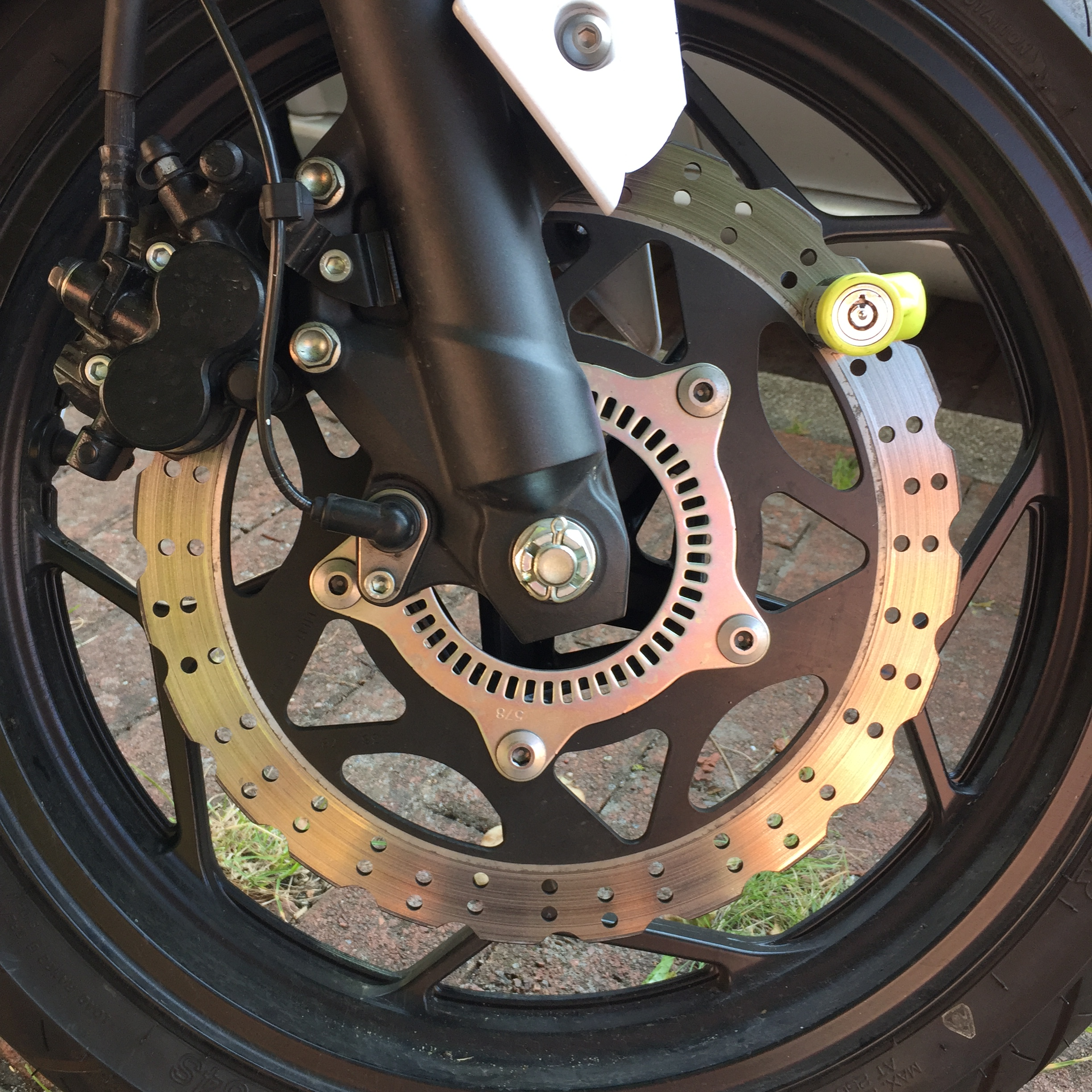 Bremsscheibenschloss an einer Kawasaki Ninja